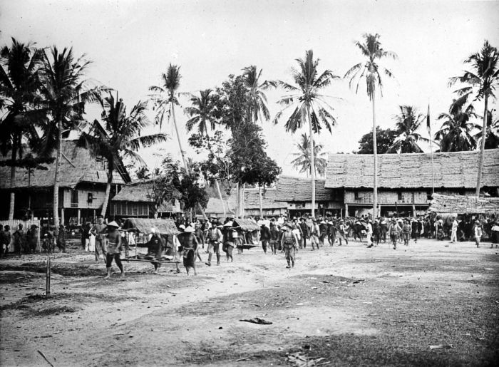 Repronegatief. La Pawawooi, de voormalige raja van Bone, wordt over de kampong gedragen, Celebes